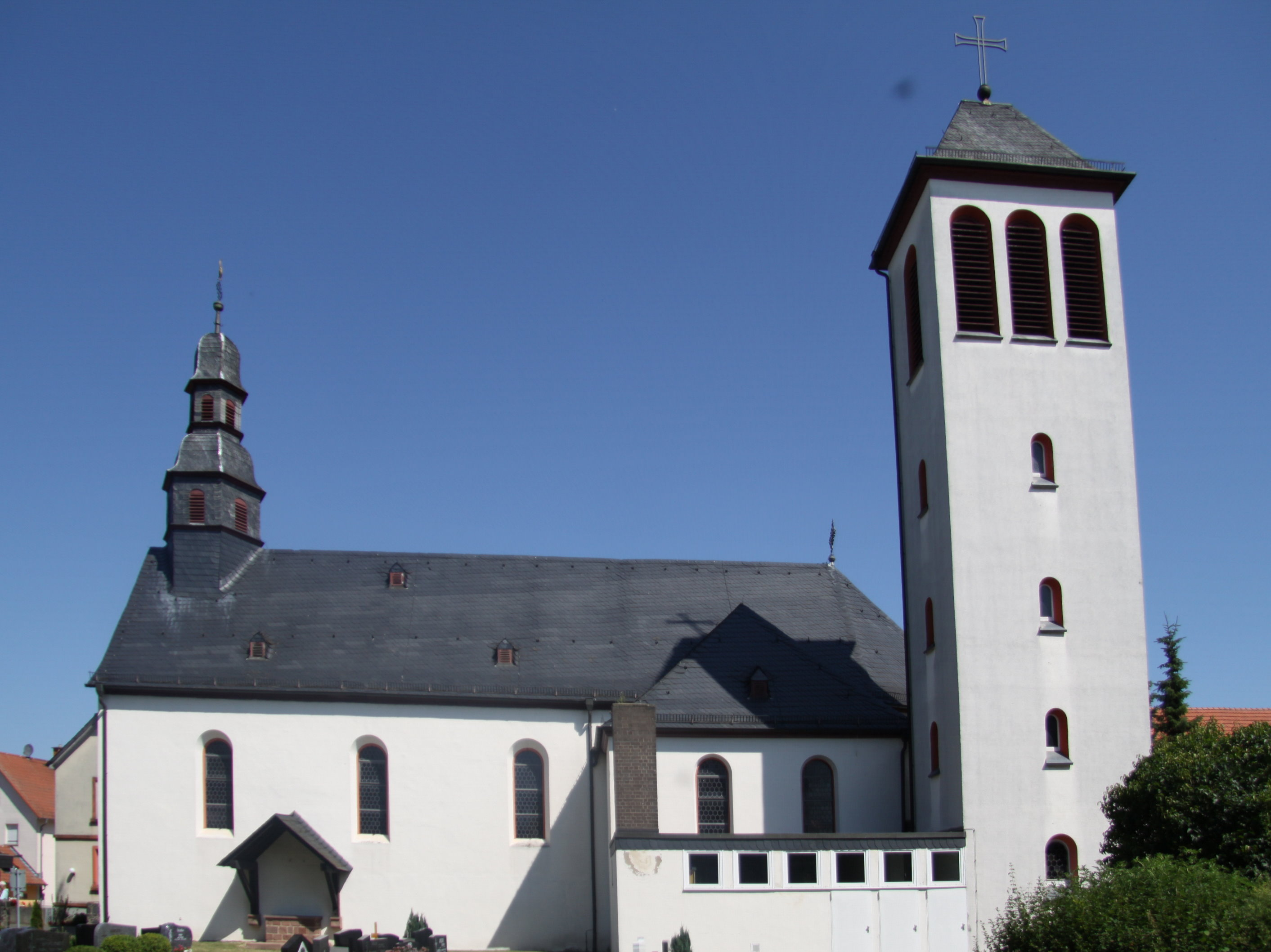 Kath. Pfarrkirche